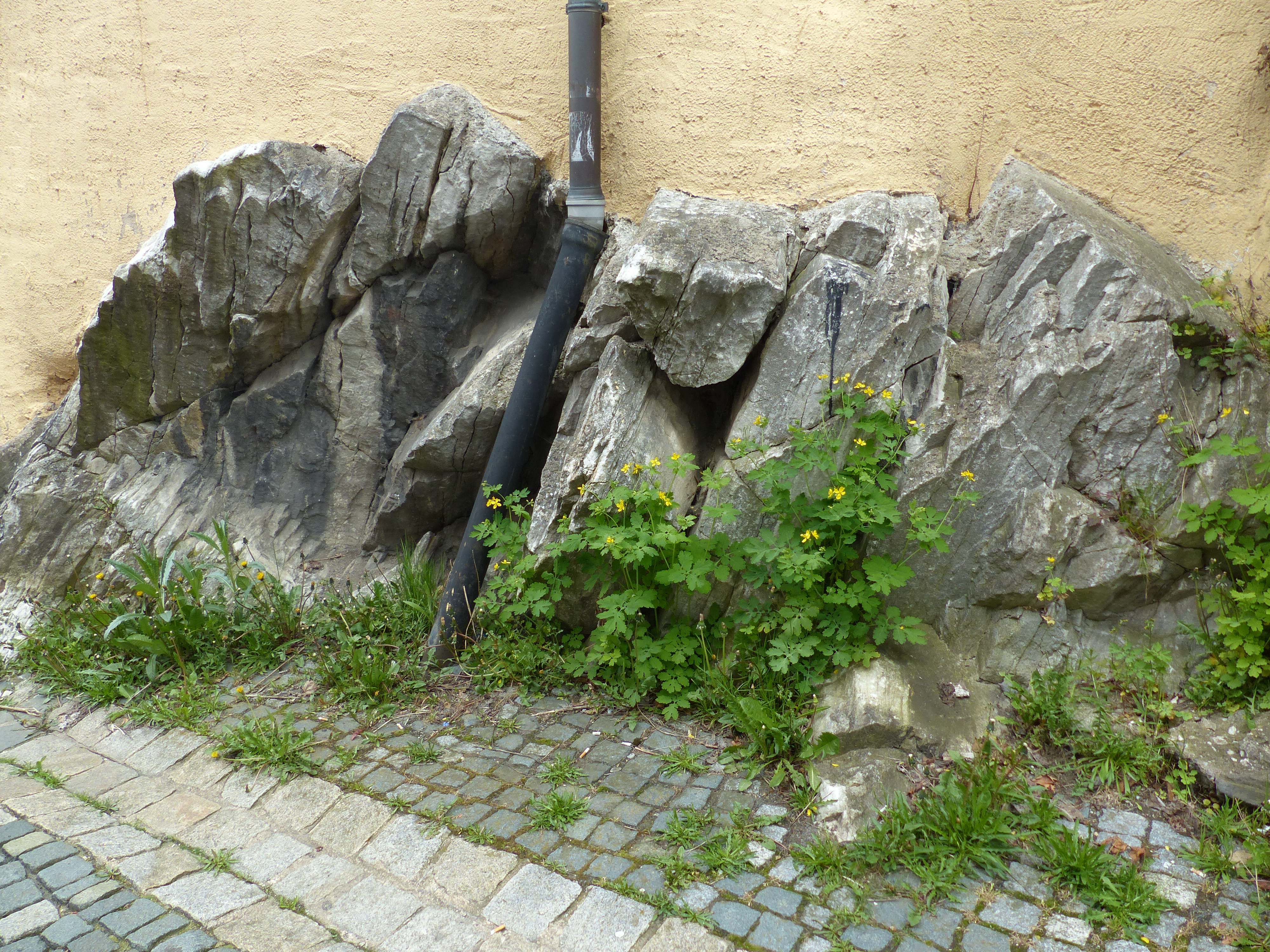 Marmor-Aufschluss im Burggraben Wunsiedel